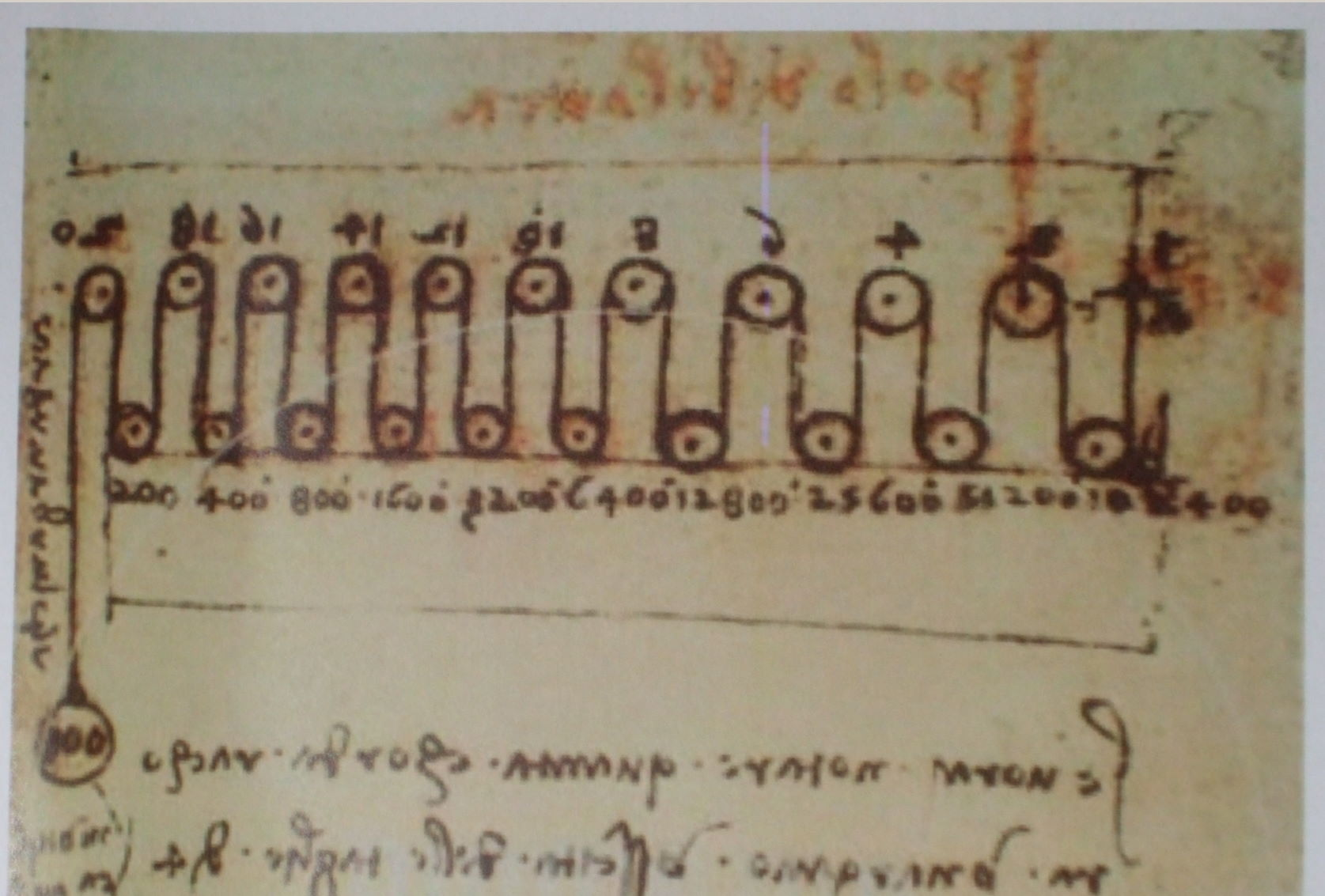 Zeichnung von Leonardo mit 20 Rollen, 1:20! nicht wie in der Zeichnung 100:102400 (1:1024)